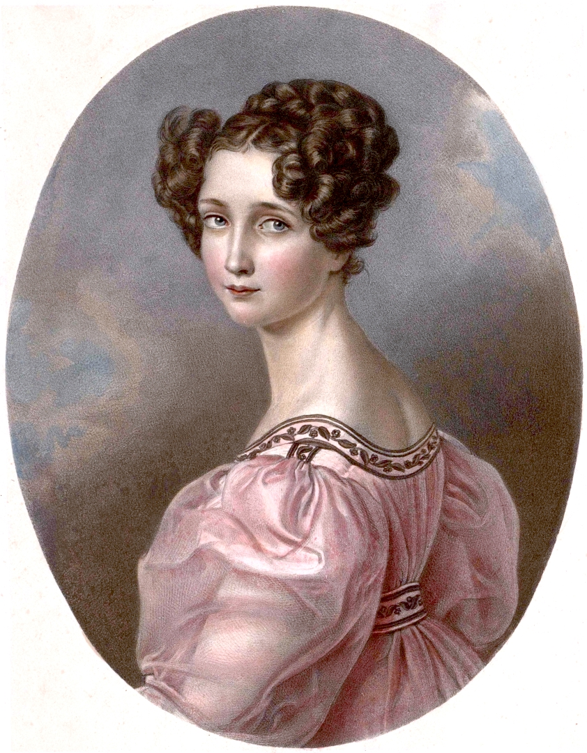 Sophie, Prinzessin von Bayern (1805 - 1872).